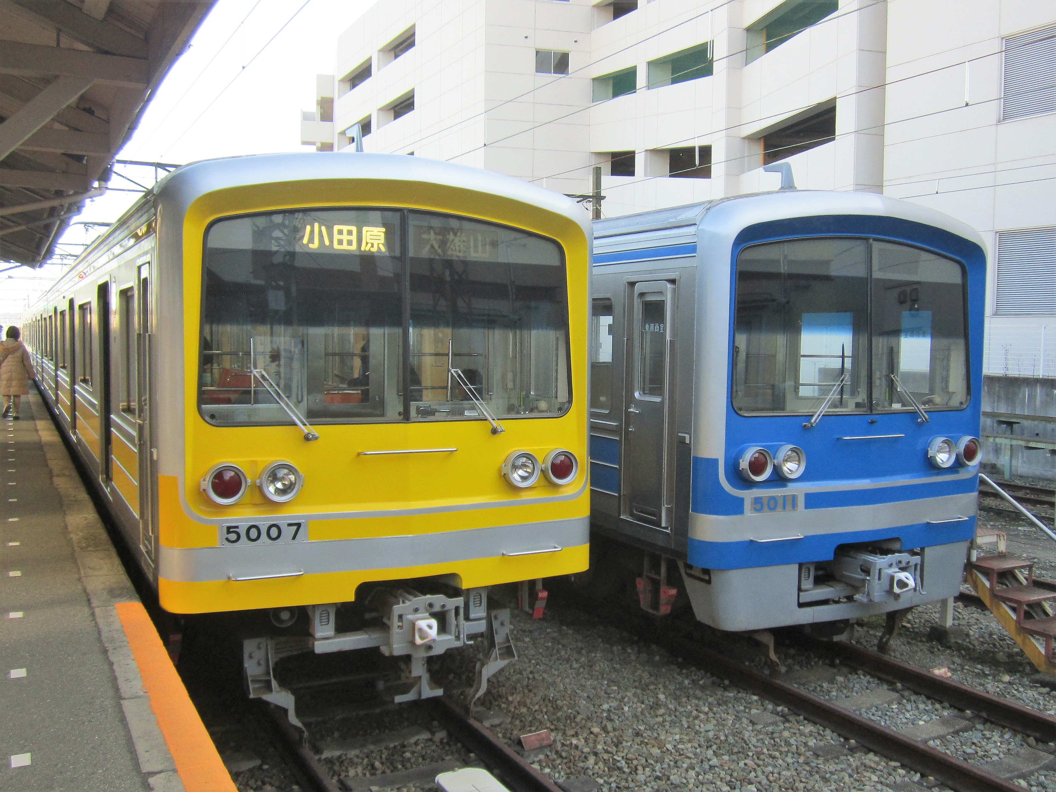 大雄山駅に停車中の伊豆箱根鉄道5000系5007・5011